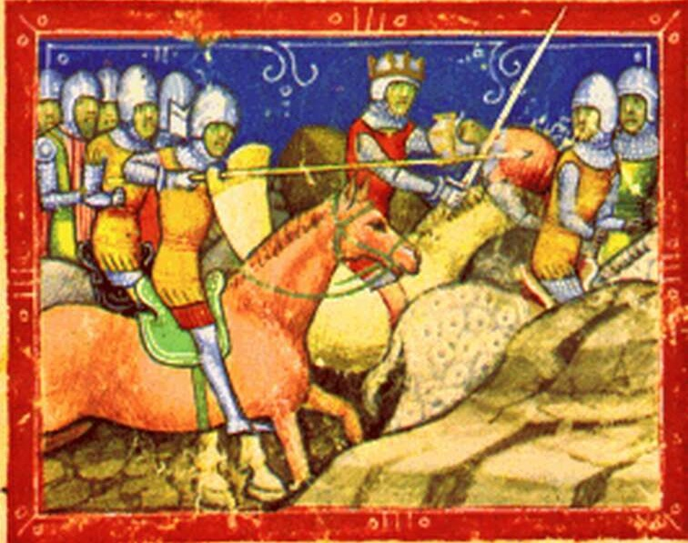 Béla IV. + Ottokar II